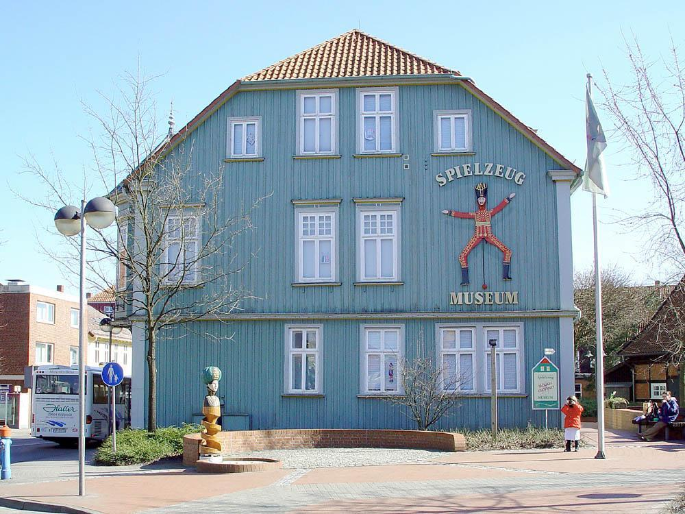 Beschreibung: Norddeutsches Spielzeugmuseum Soltau Aufnahmedatum: 22. März 2003 Fotograf: ArtMechanic